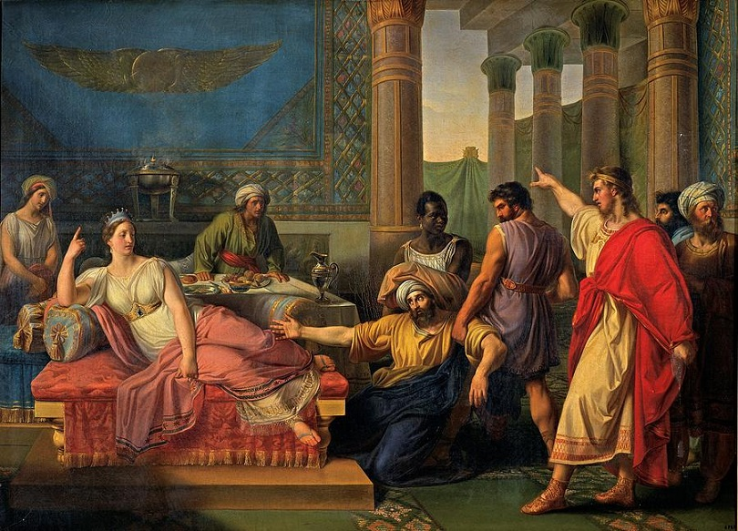 "La punizione di Aman", olio su tela, Palazzo Ducale di Mantova